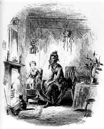 Dombey and Son, Le Petit Paul chez Mrs Pipchin (chapitre 8)